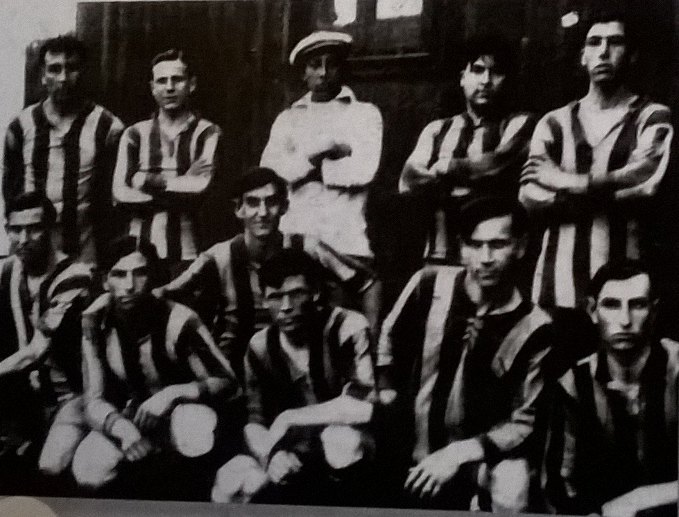 Rosario Central en 1912. Parados aparecen Zenón Díaz en primer lugar e Ignacio Rota cuarto. Hincado en el centro está Harry Hayes.